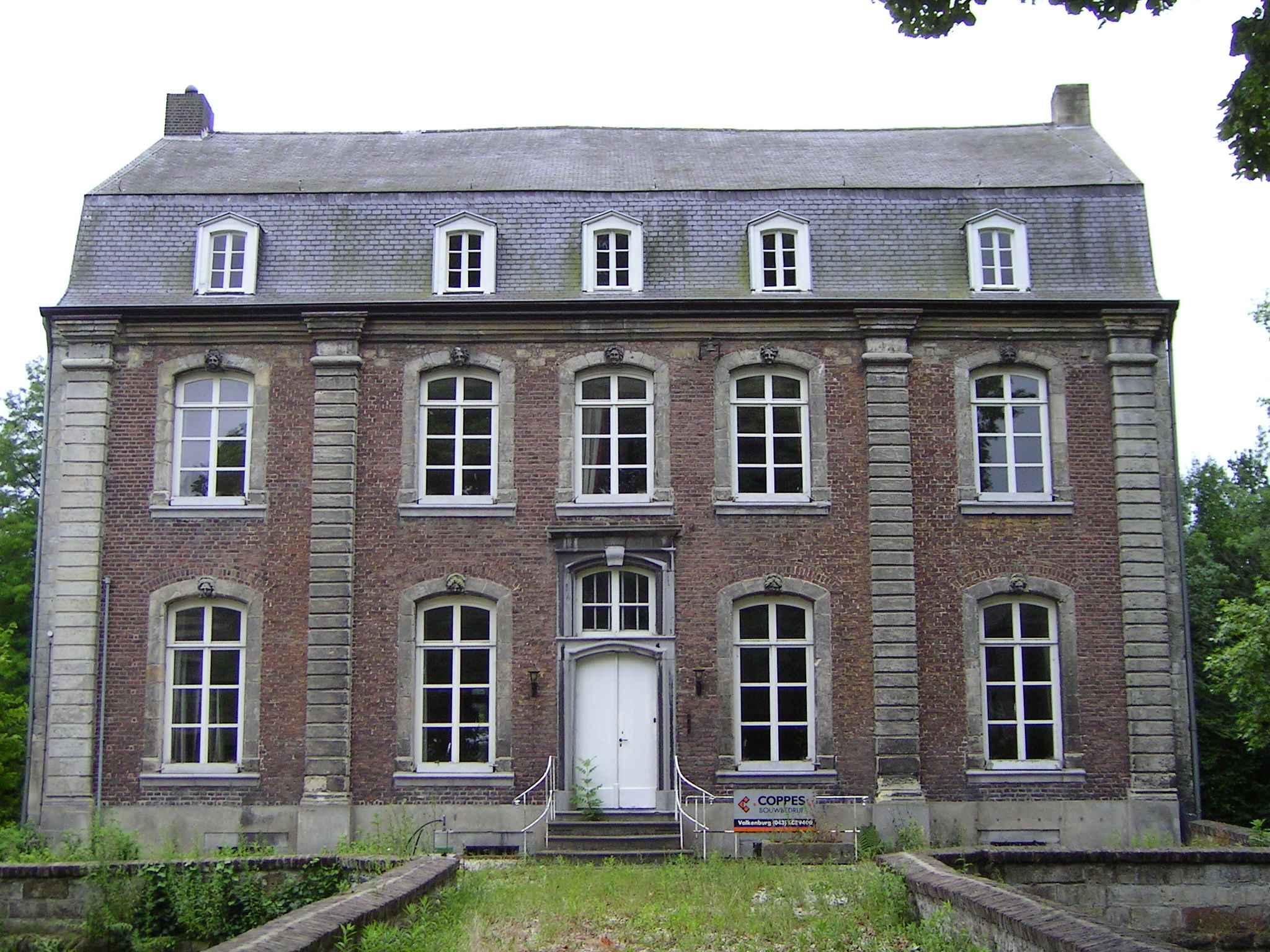 Vooraanzicht kasteel Puth, eigen foto, ca. 2006 - Huijts